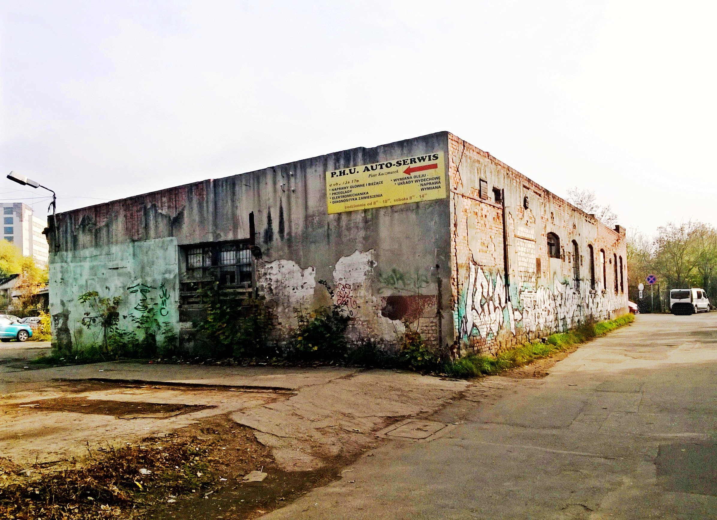 Pomorska Fabryka Samochodów, Motorów i Maszyn w Toruniu